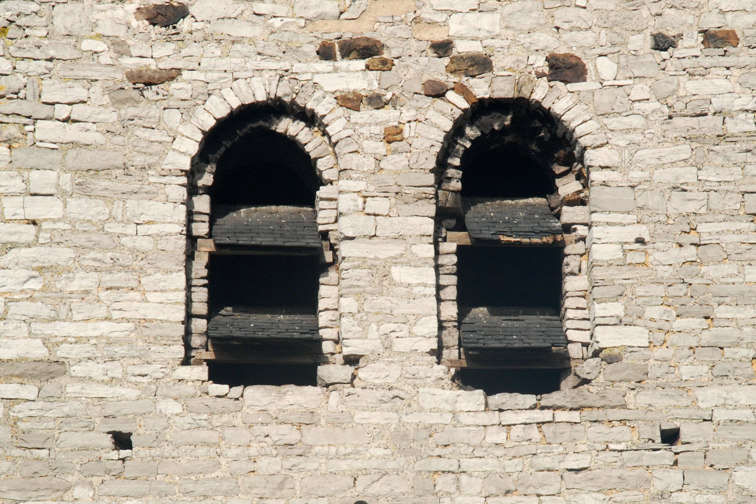 Belgique - Hainaut - Aiseau-Presles - Pont-de-Loup - Tour romane